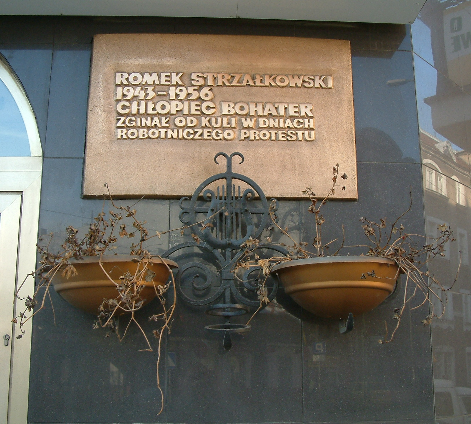 Plate memorating Romek Strzałkowski, victime of Poznań June 1956